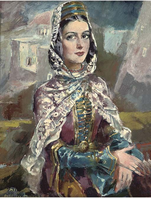 Портрет маслом на картоне неизвестной в аварском праздничном национальном наряде. Художник - гражданин Ирана Халилбег Мусаясул.Iran, 1939.